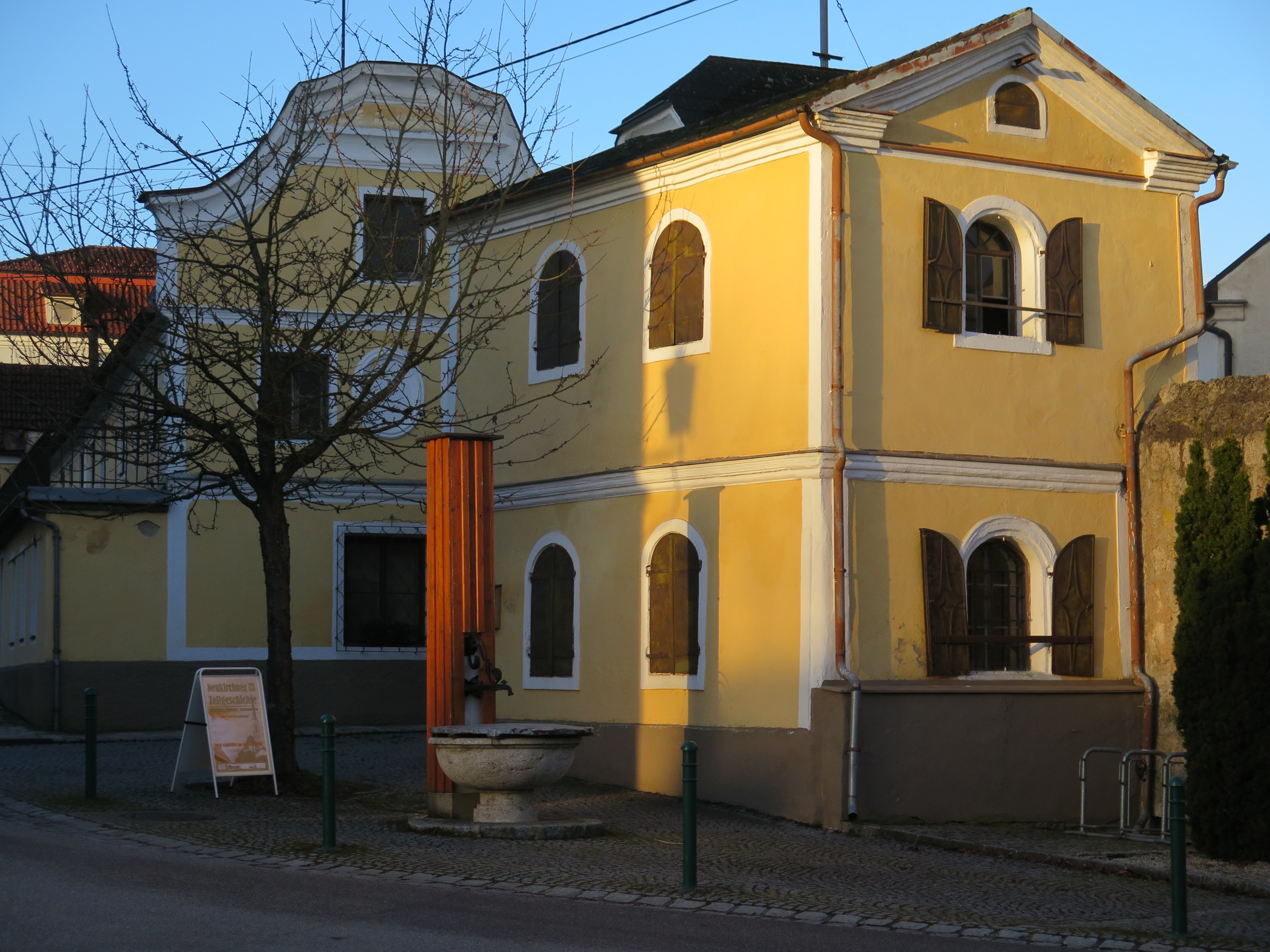 Krämerhaus und Magazin